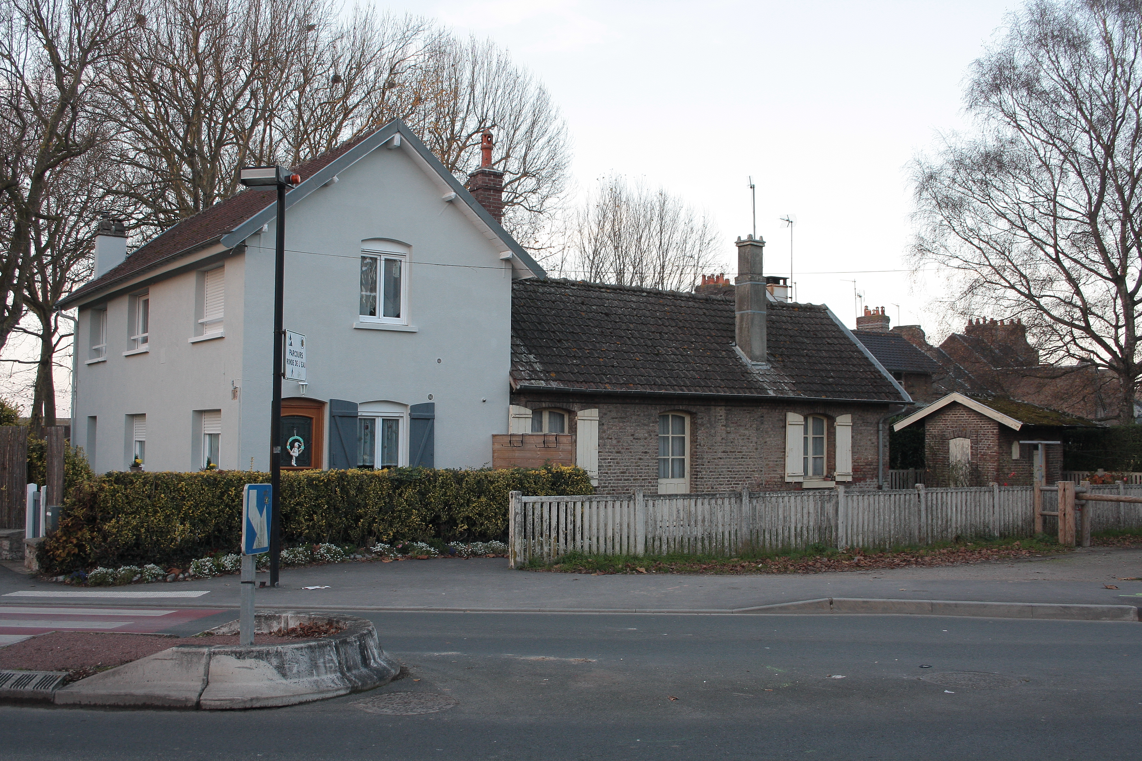 Ancien bâtiment voyageurs (côté "La Traverse du Ponthieu") de la halte d'Abbeville-Porte-du-Bois, transformé en habitation.